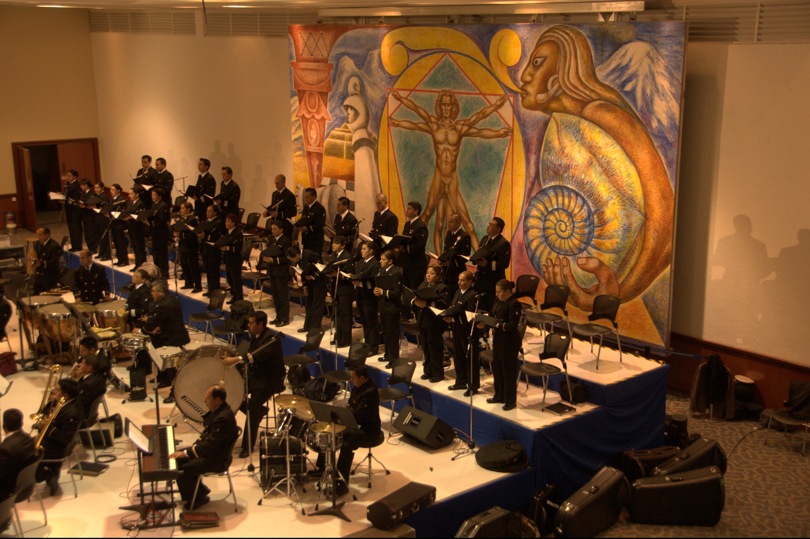 1 Orquesta sinfónica y Coro de la Secretaría de Marina Armada en ITESM Campus Ciudad de México